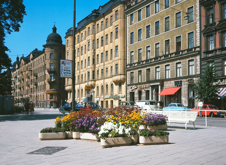 Blomsterarrangemang på Odenplan. Odenplans bilskola syns i bakgrunden